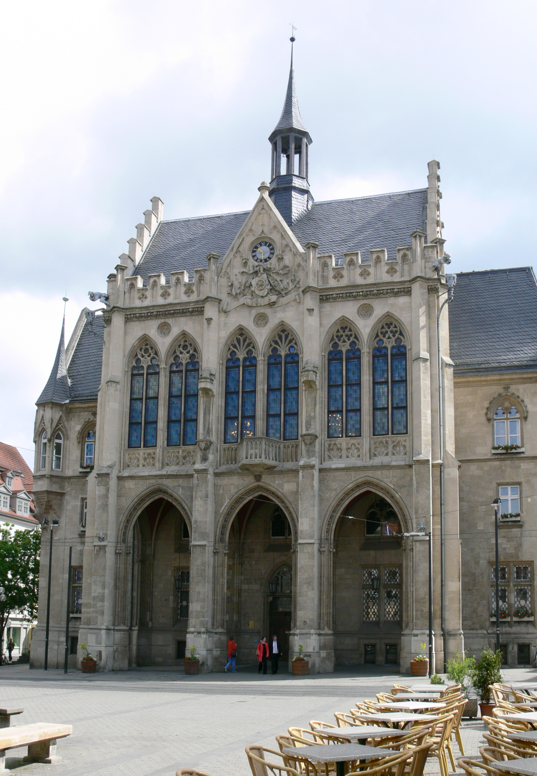 Rathaus Erfurt (heutige Form 1869 errichtet), auf dem Fischmarkt in Erfurt